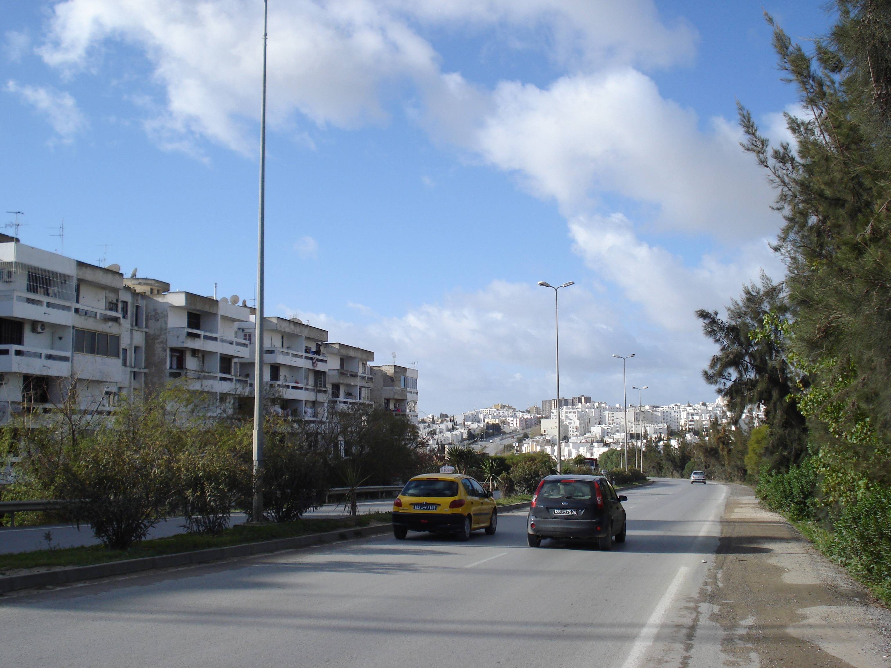 Route régionale n°25, Ennasr, Ariana, Tunisie